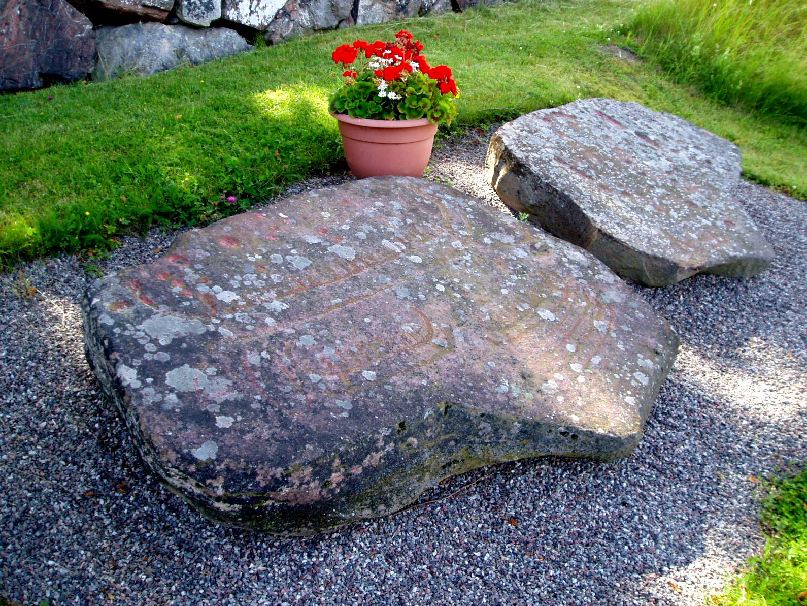 Hällarna från Tuna, Södermanland